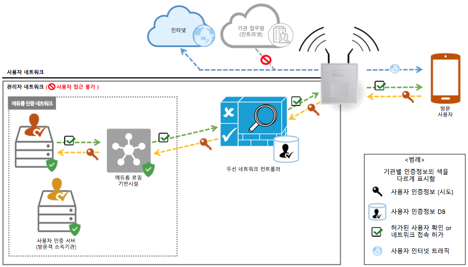 에듀롬 인증 네트워크 구조